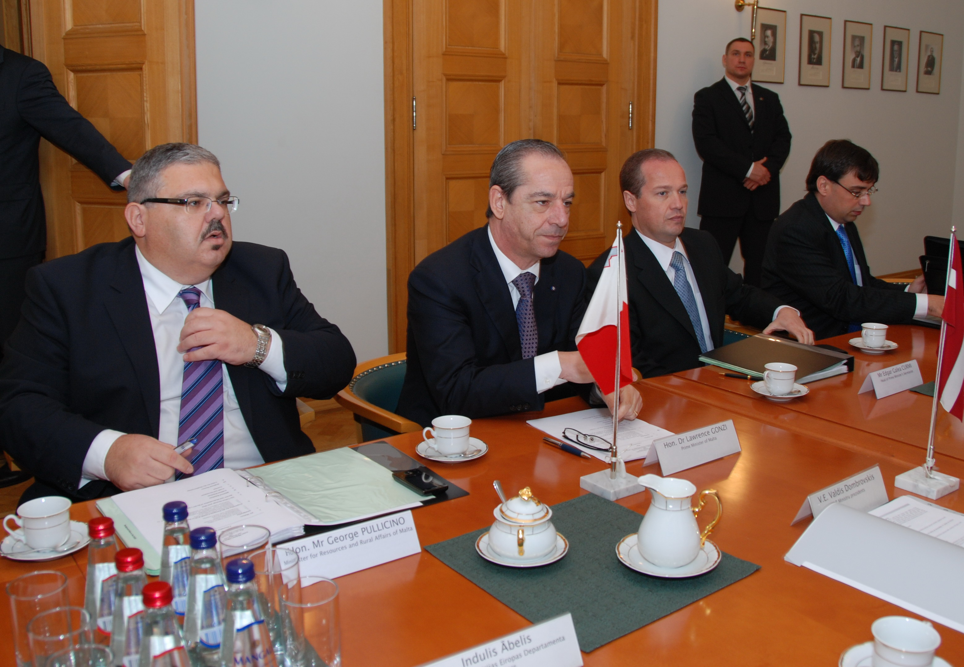 Maltas premjerministrs Lorenss Gondzi (otrais no kreisās), Maltas dabas resursu un lauku jautājumu ministrs George Pullicino (pirmais no kreisās), premjerministra Sekretariāta vadītājs Edgar Galea Curmi (otrais no labās), Maltas valdības Komunikācijas departamenta vadītājs Gordon Pisani (pirmais no labās)